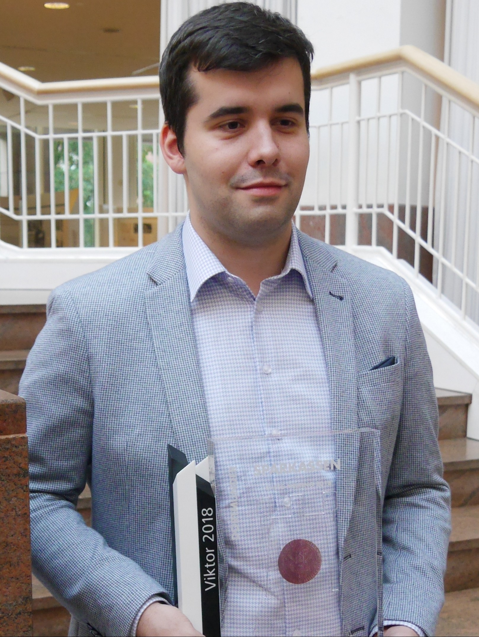 Jan Nepomniachtchi, Sieger der Dortmunder Schachtage 2018.